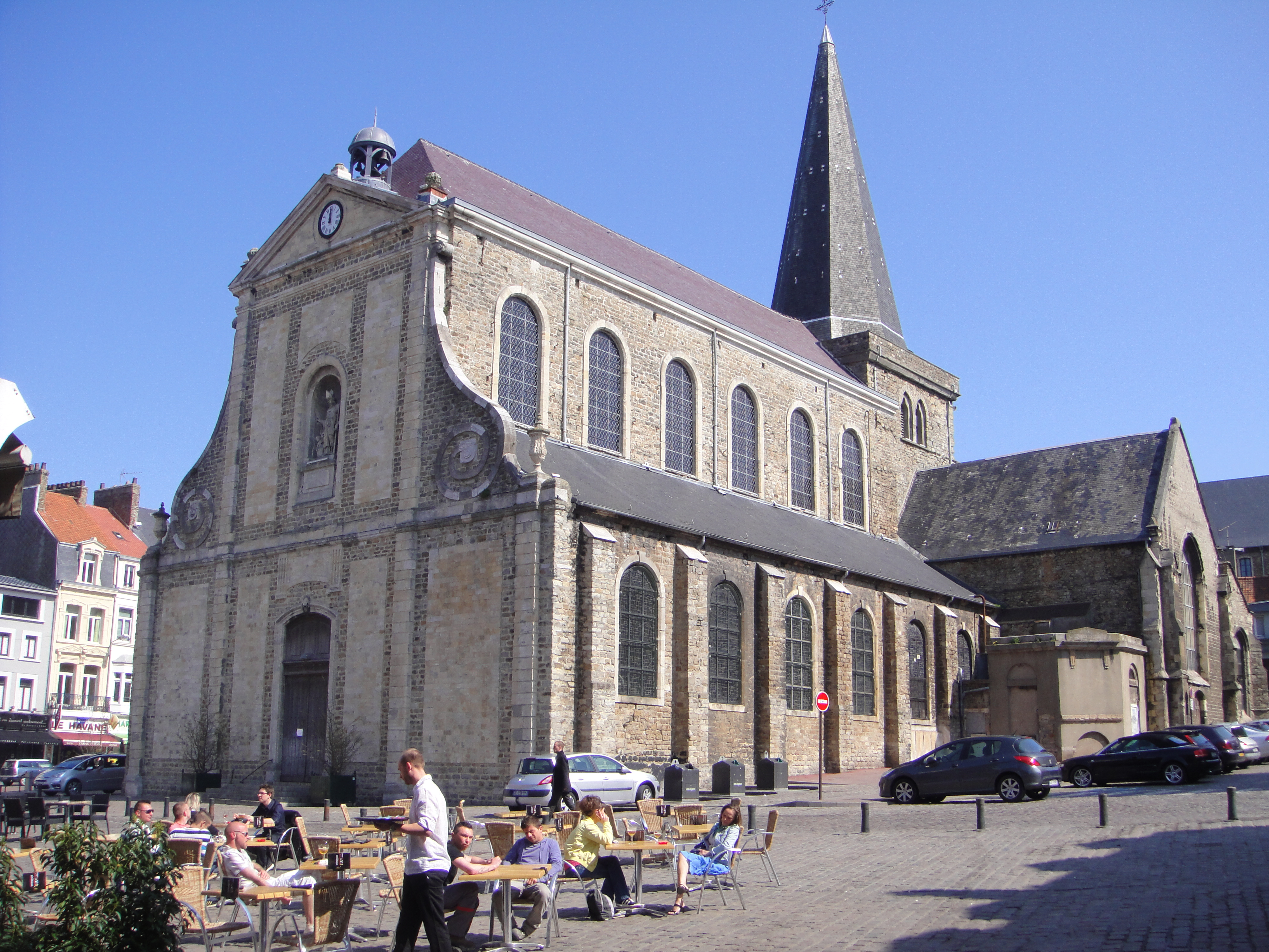 Église Saint-Nicolas de Boulogne-sur-Mer Photo prise par Bateloupreaut le 25 avril 2013